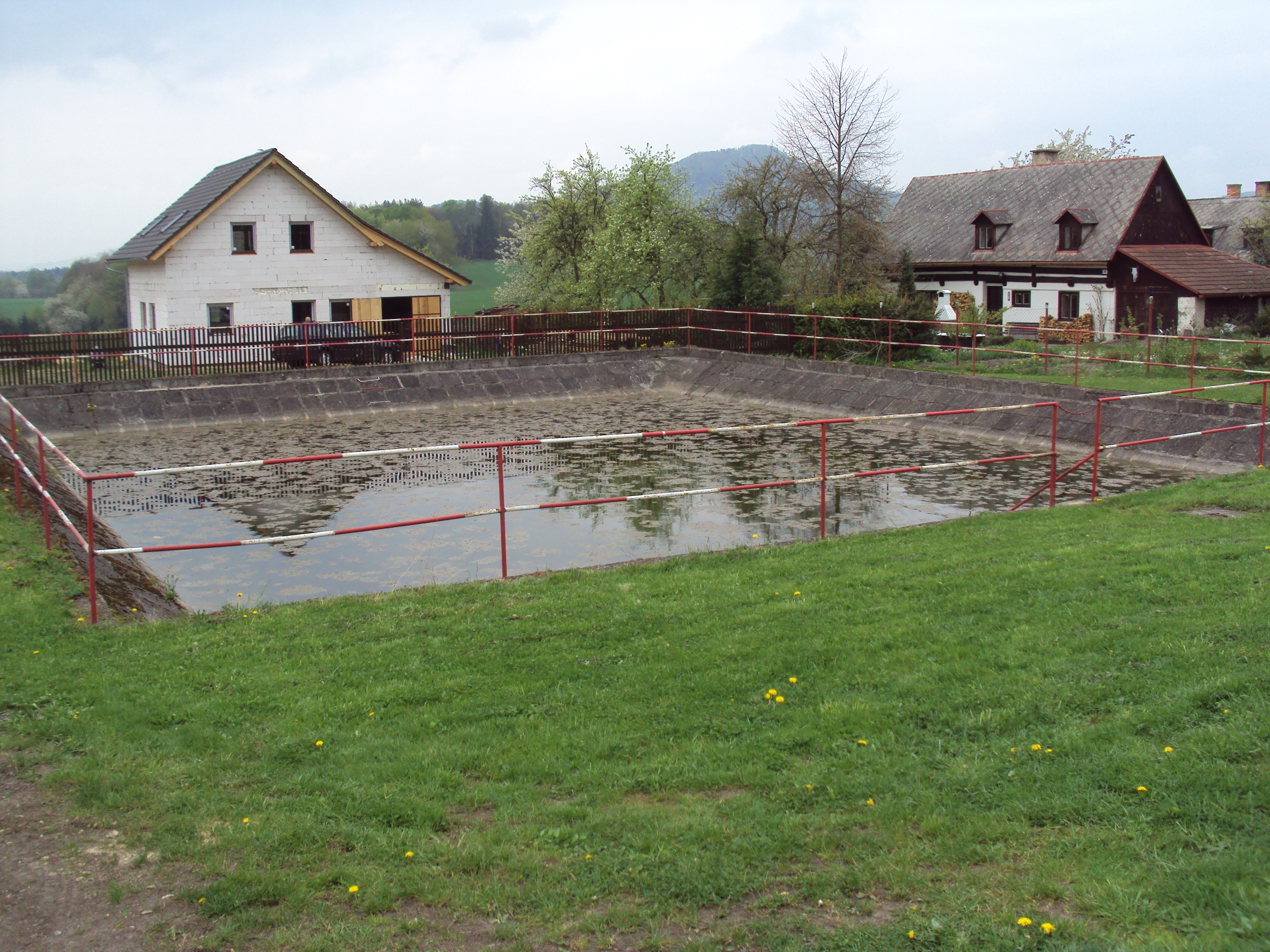 Požární nádrž uprostřed Lasvic